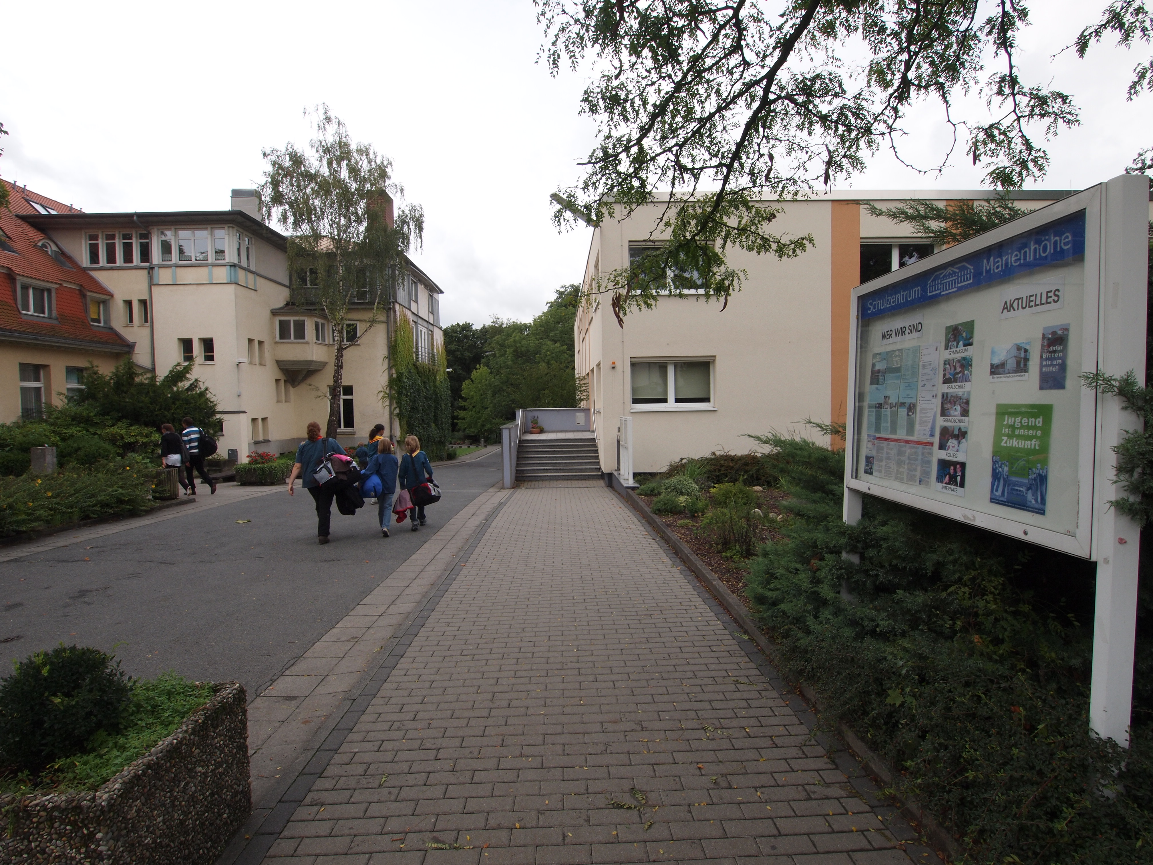 Schulzentrum Marienhöhe in Darmstadt